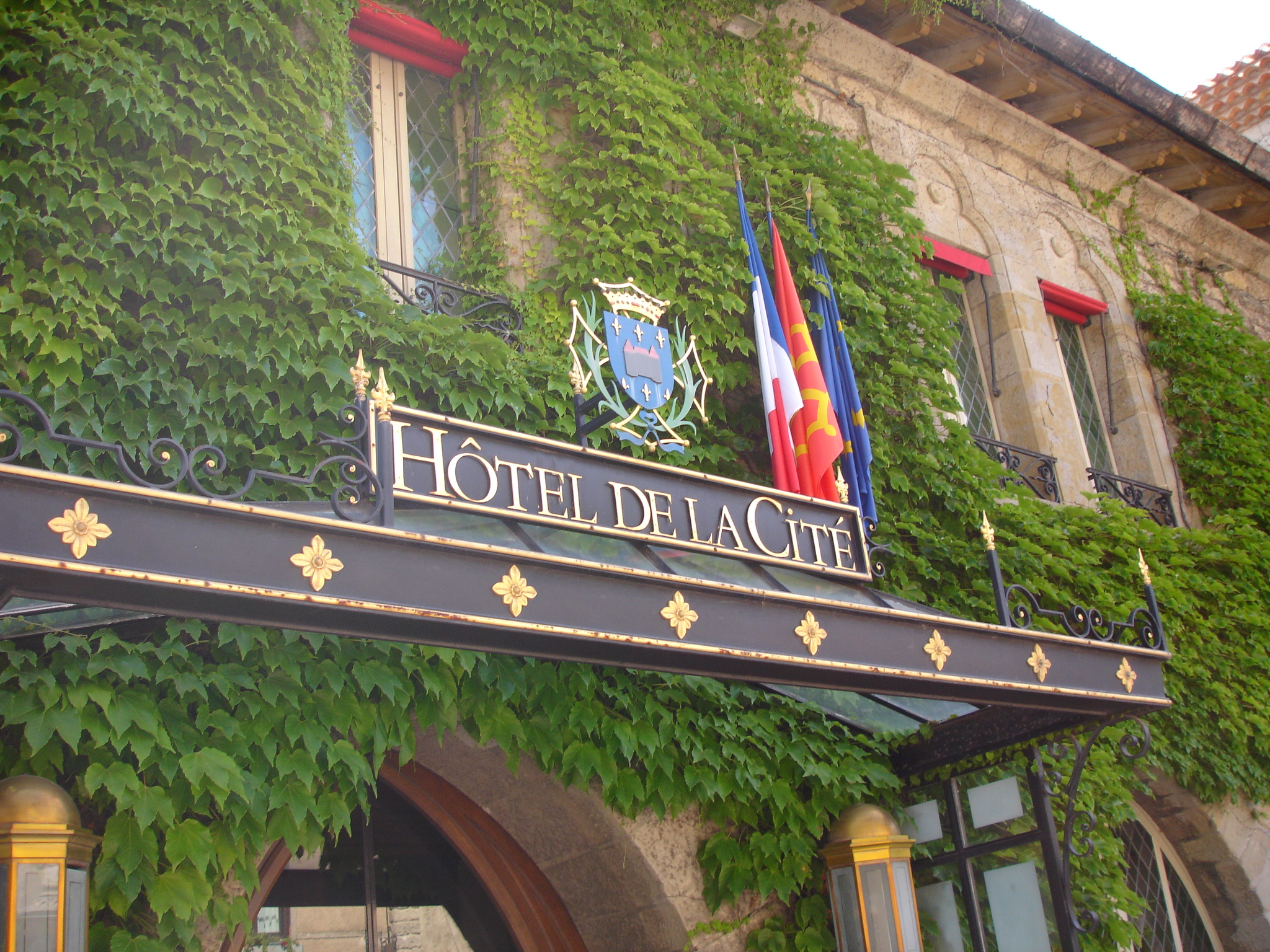 Carcassonne (Aude, France) - Hôtel de la Cité